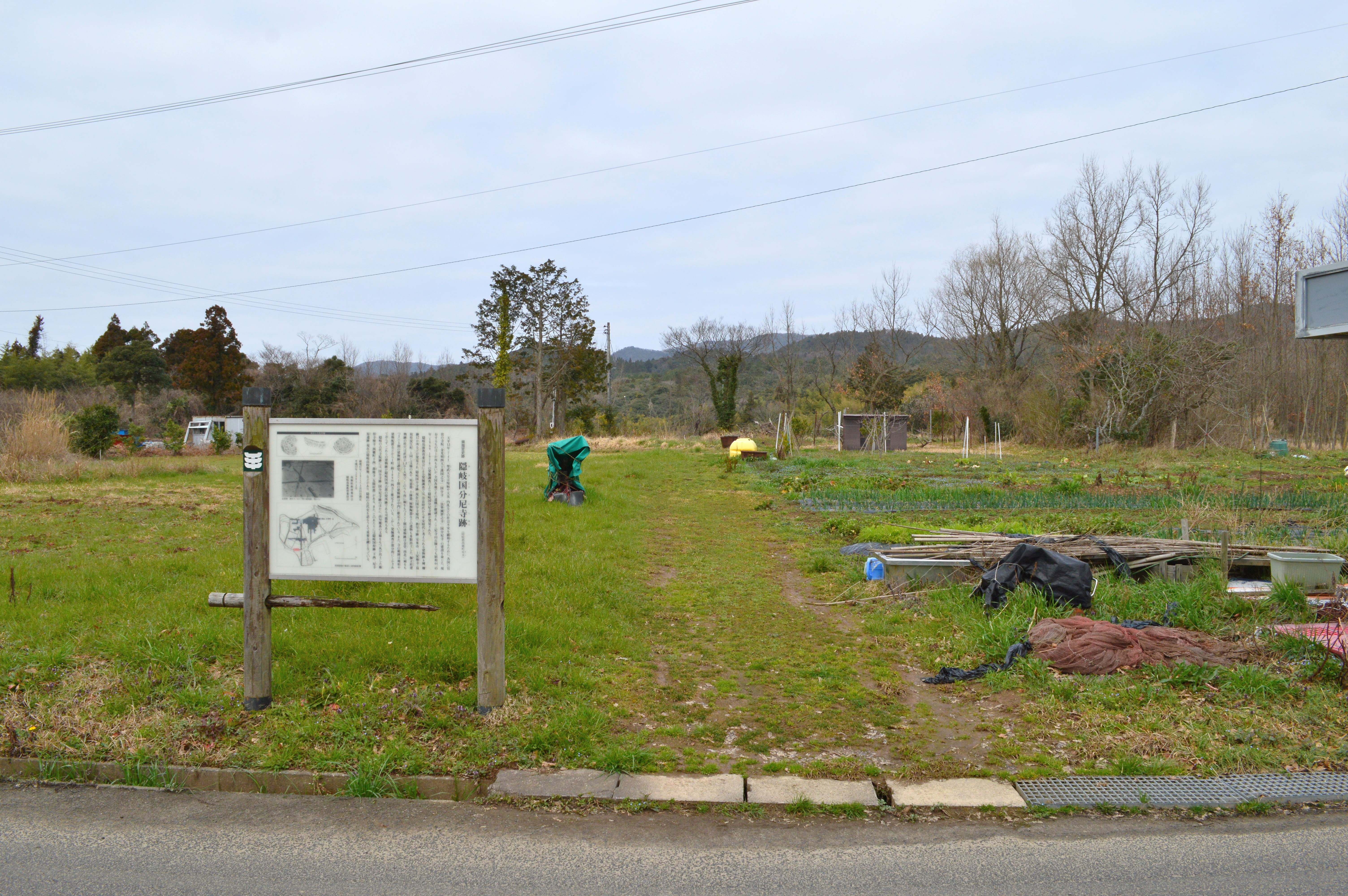 隠岐国分尼寺跡 概観